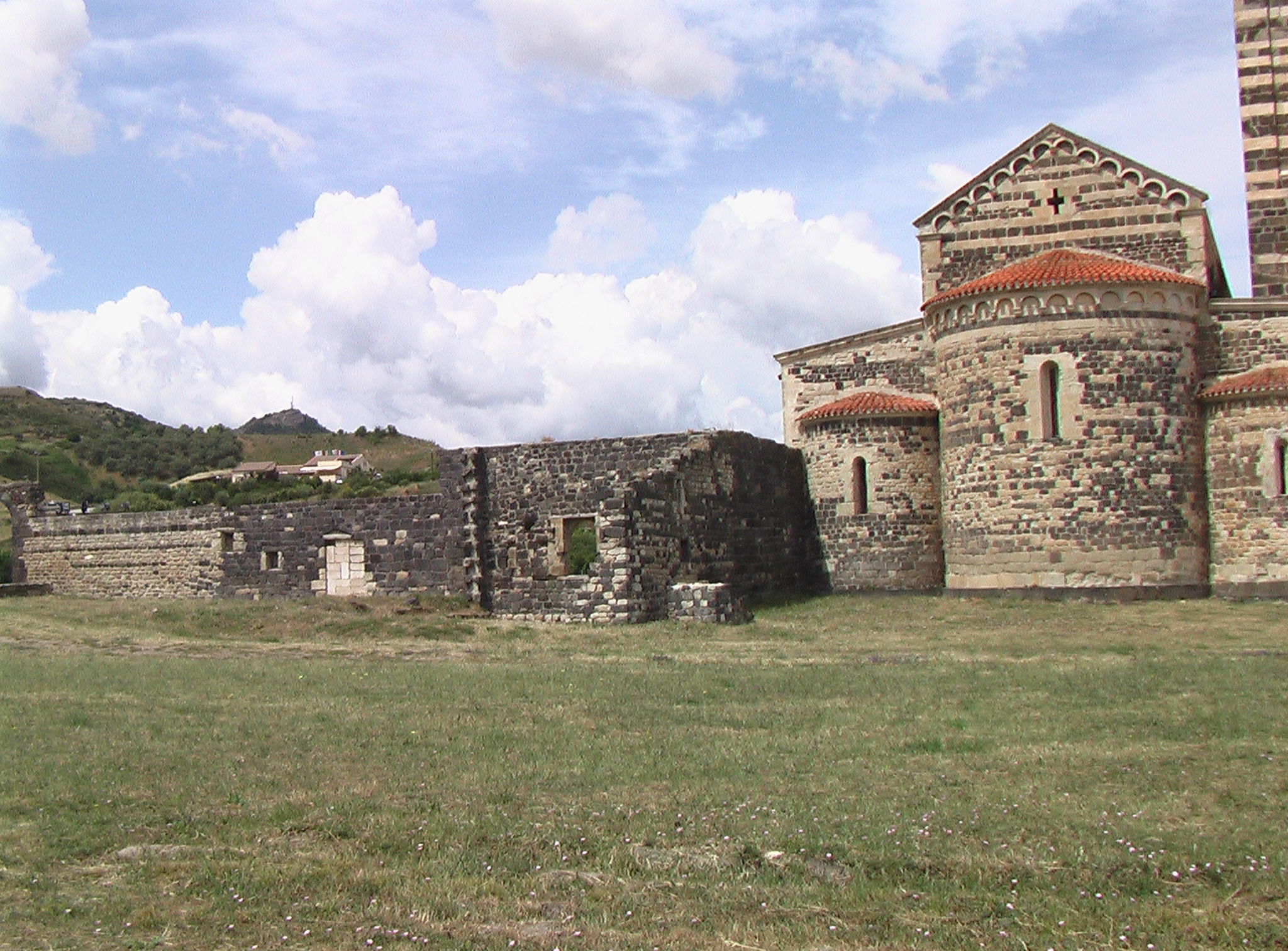 Retro della Basilica con mura del monastero